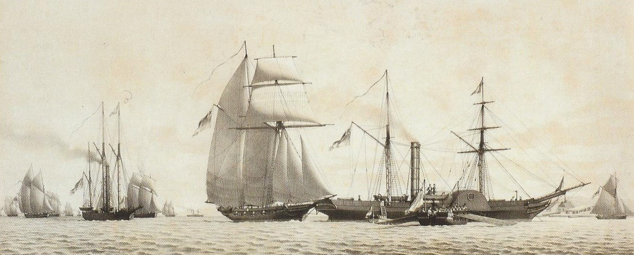 Schleswig-Holsteinische Flottille im Kieler Hafen (l-r): „Von der Tann“ (1849), „Elbe“ und „Bonin“.